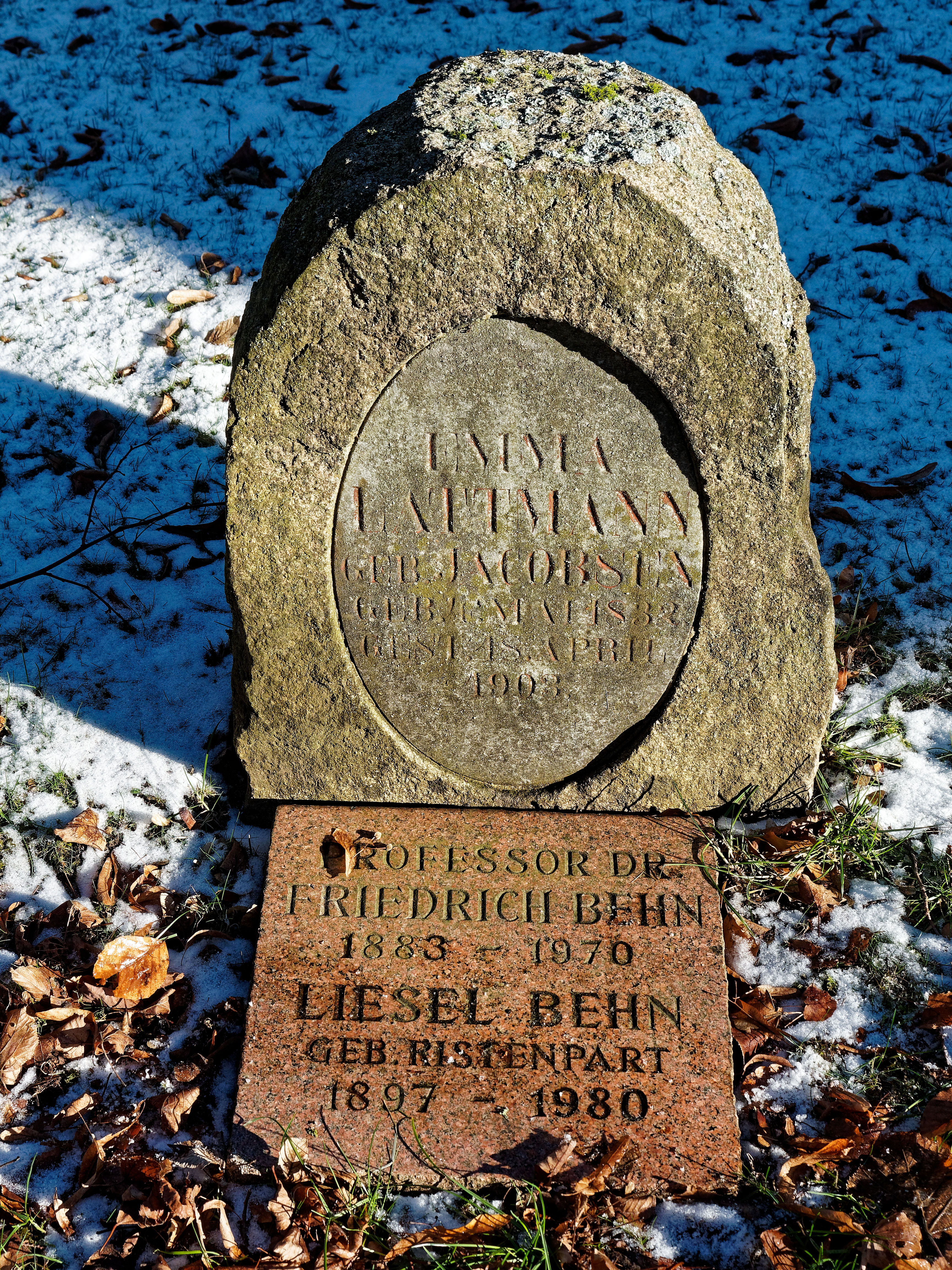 Grabstein von Friedrich Behn auf dem Alten Friedhof in Goslar